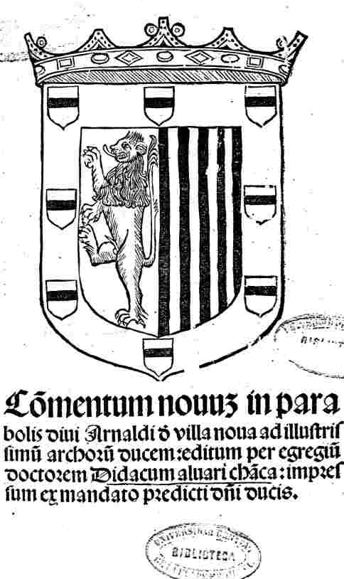 Diego Alvarez Chanca, Commentum novum (1514) title page